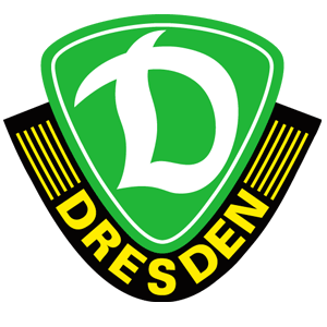 Historisches Logo des 1. FC Dynamo Dresden (1990-2011)